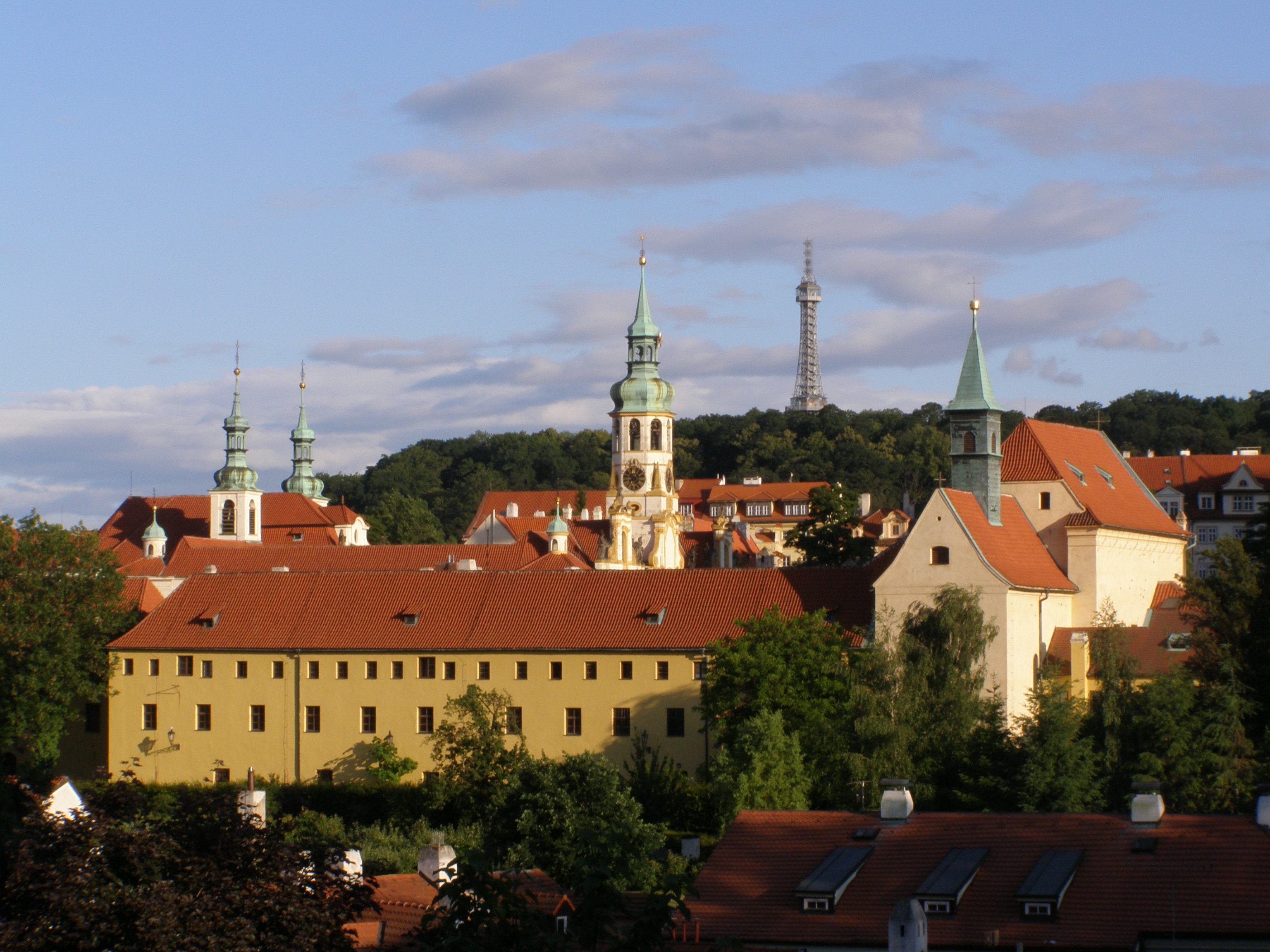 Praha, Hradčany, vpravo kostel Panny Marie Andělské, vlevo Loreta (vpravo průčelní věž, vlevo věže kostela Narození Páně), v pozadí Petřínská rozhledna, pohled z rozhraní ulic Černínská a Jelení